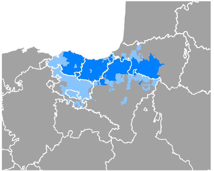 Idioma vasco +50% con dominio +10% con dominio